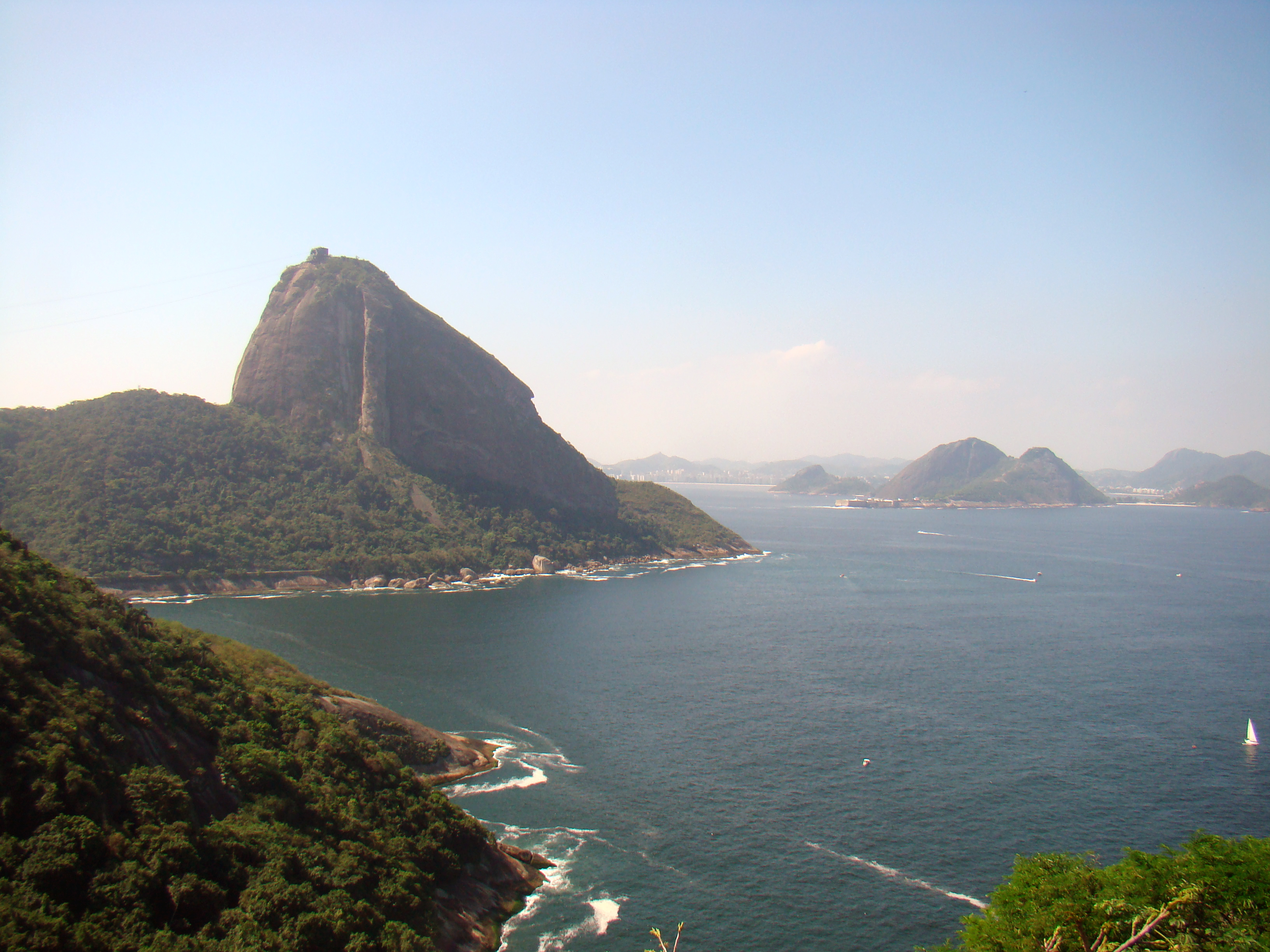 Foto tirada do Forte Duque de Caxias (forte do Leme)